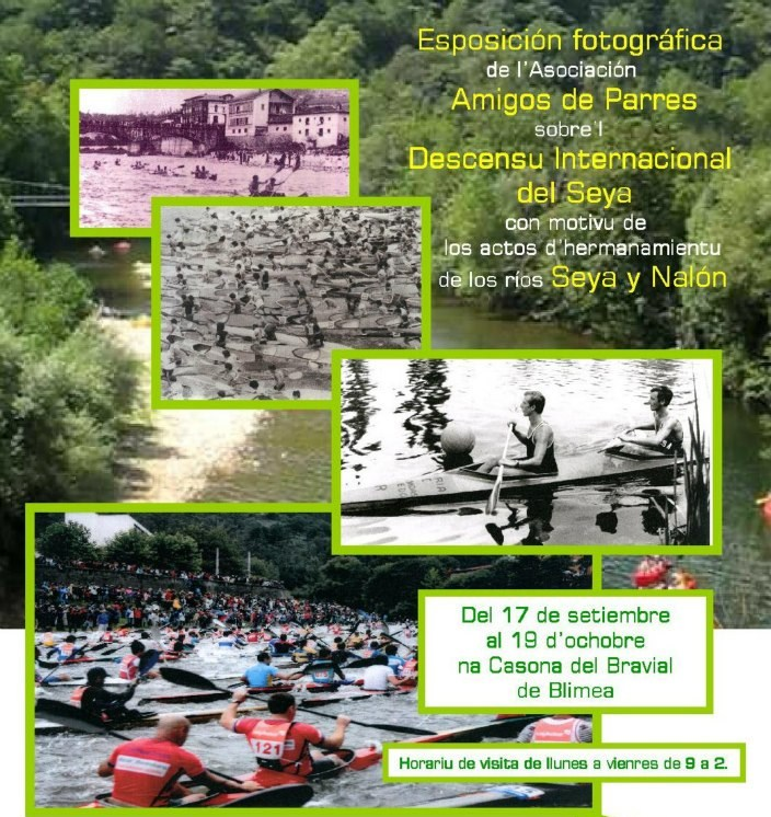 Esposición sobre'l Descensu del Seya